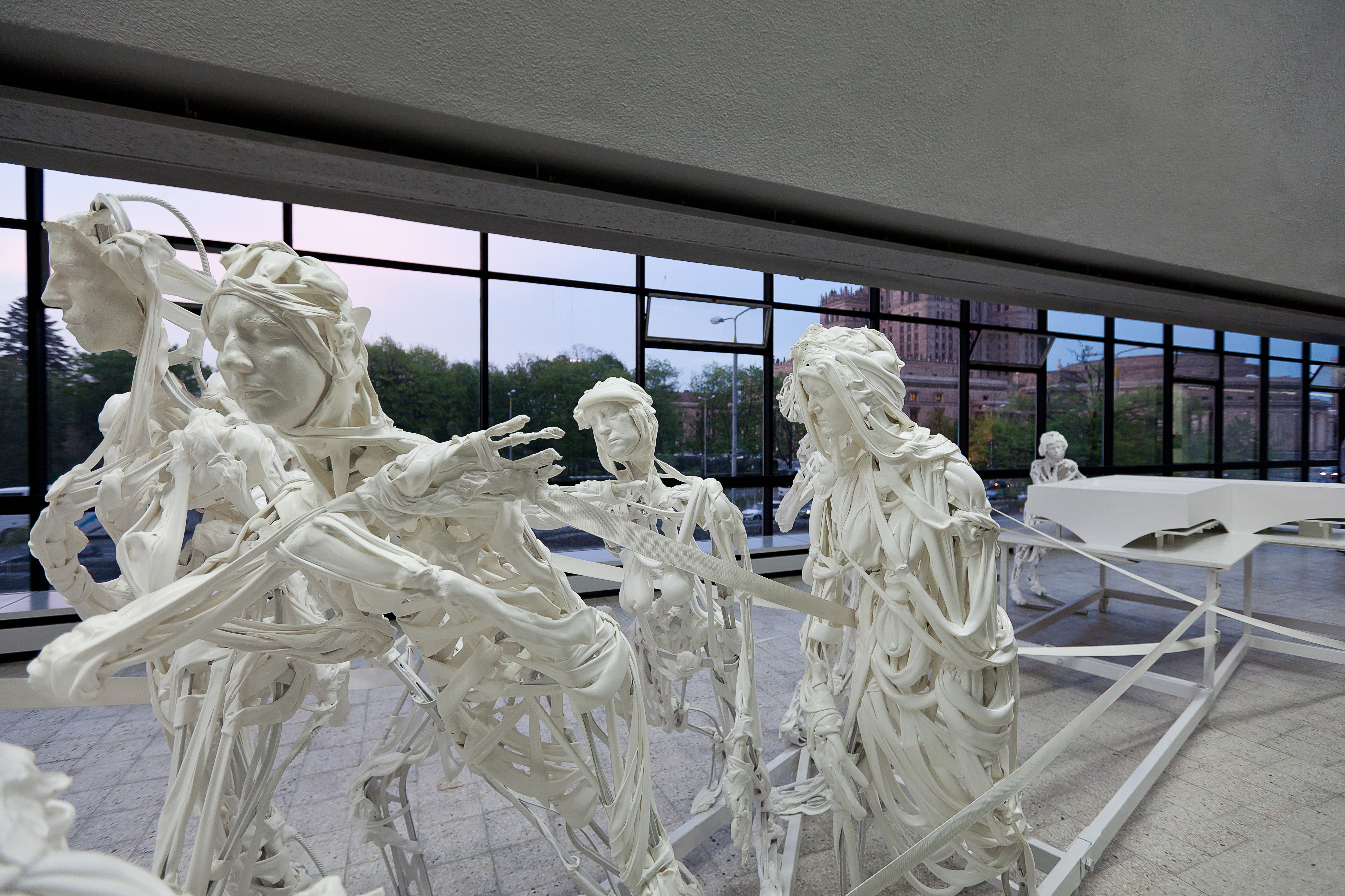 Burłacy to praca zainspirowana sytuacją Muzeum Sztuki Nowoczesnej w Warszawie – instytucji, która nieustannie zabiega o wybudowanie swojego gmachu, a tym samym przypieczętowanie swego istnienia i utrwalenie miejsca kultury współczesnej w społeczeństwie. Althamer posłużył się odwołaniem do bardzo znanego obrazu Burłacy na Wołdze (1873) Ilji Riepina, rosyjskiego malarza, który łączył realizm przedstawienia z sympatią dla ludu. W rzeźbie, wykonanej autorską techniką artysty, znalazły się przedstawienia 11 pierwszych członków zespołu Muzeum (można ich rozpoznać dzięki odlewom twarzy), którzy z wysiłkiem, ale i w zapamiętaniu ciągną – jak burłacy – model Muzeum, które kiedyś ma powstać. Ta grupa rzeźbiarska to wyjątkowy obiekt w kolekcji Muzeum. Nie tylko dokumentuje heroiczny etap istnienia instytucji, jest wyrazem wsparcia dla wysiłków zmierzających do stworzenia w Warszawie muzeum sztuki nowoczesnej, ale i wskazuje na silne przekonanie artysty o społecznej roli sztuki.